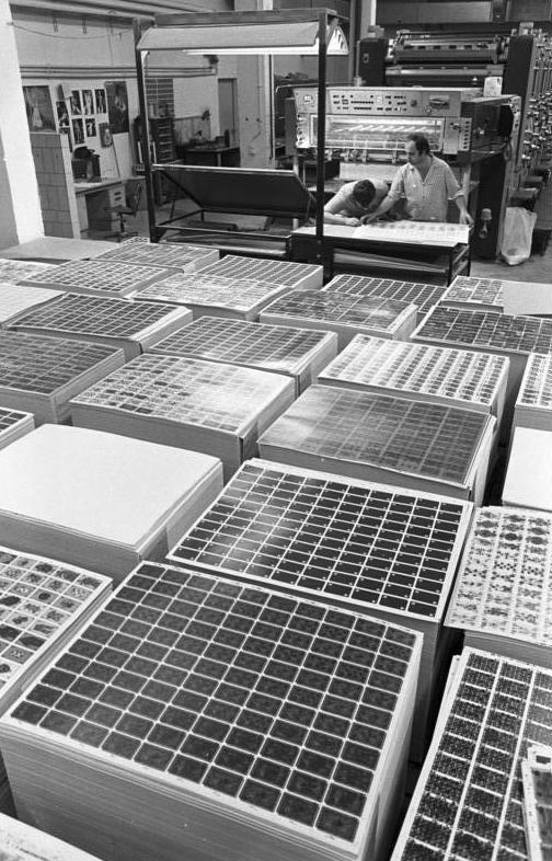 Altenburg, Spielkartenherstellung ADN-ZB/Kluge 3.1.1990 Bez. Leipzig: Fast alle Länder Mitteleuropas und der skandinavische Raum werden mit Spielkarten aus Altenburg beliefert. Seit 1832 werden in der kleinen sächsischen Stadt die "bunten Blätter" industriell gefertigt. Heute sind es Skatkarten mit deutschem als auch mit französischem Bild, Romme- und sogenannte Souvenirkarten für den Verlag Lehrmittel Pößneck, die den Drucksaal verlassen. Quartett- , Schwarzer-Peter- und Legespiele komplettieren das Angebot des Betriebes.